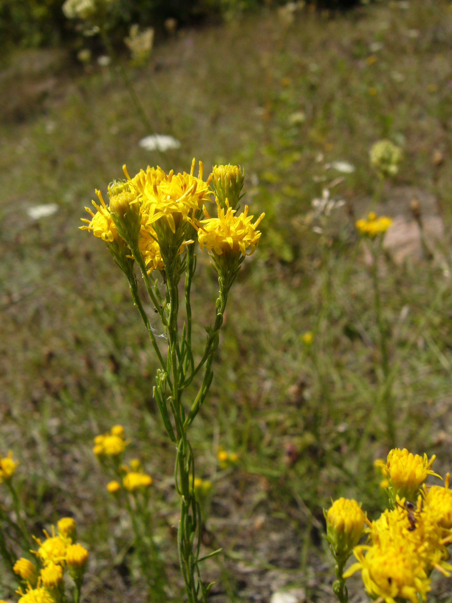 Zlatovlásek obecný, též hvězdnice zlatovlásek (Aster linosyris)